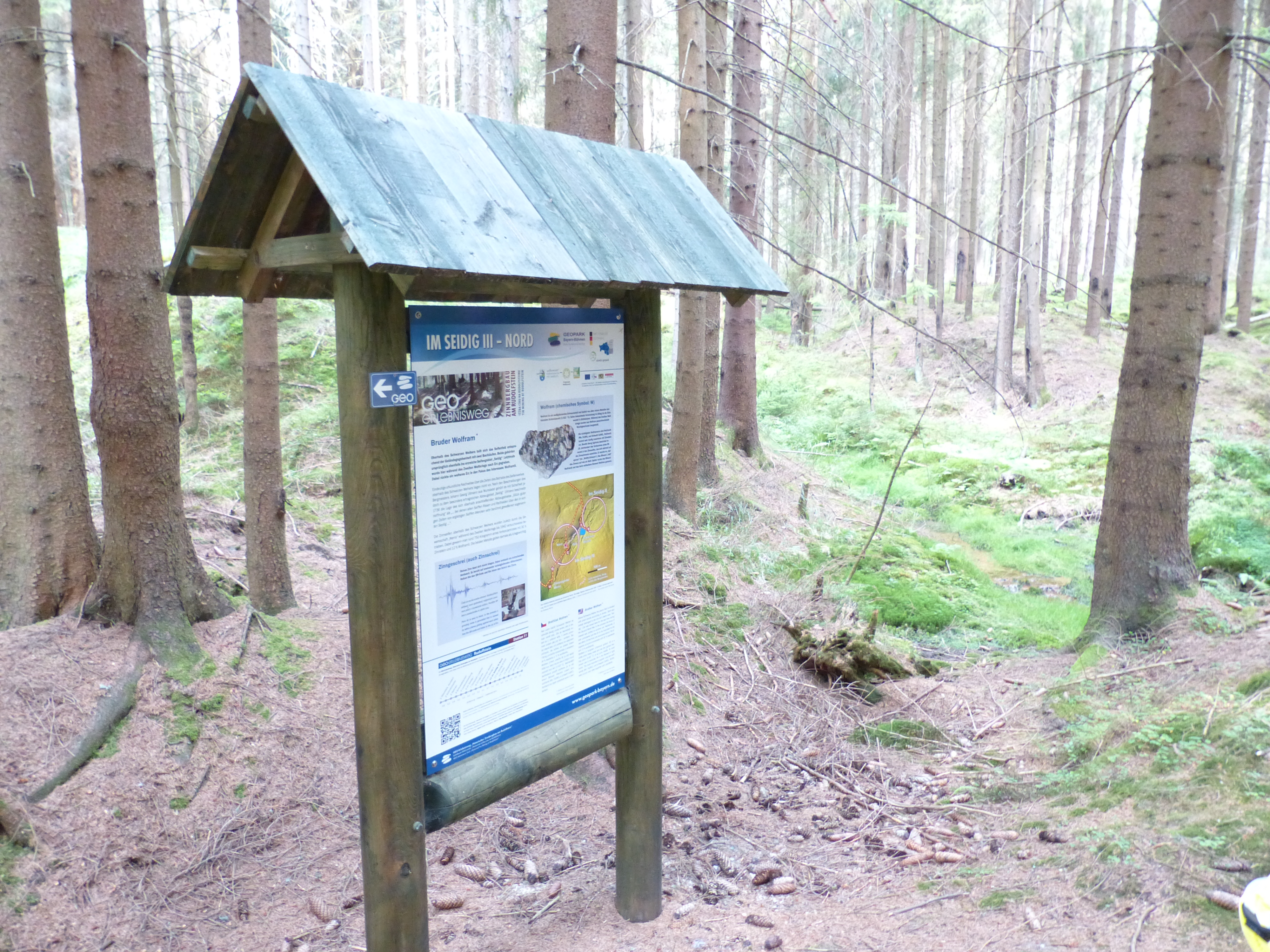 Außengelände Uranbergwerk Weißenstadt